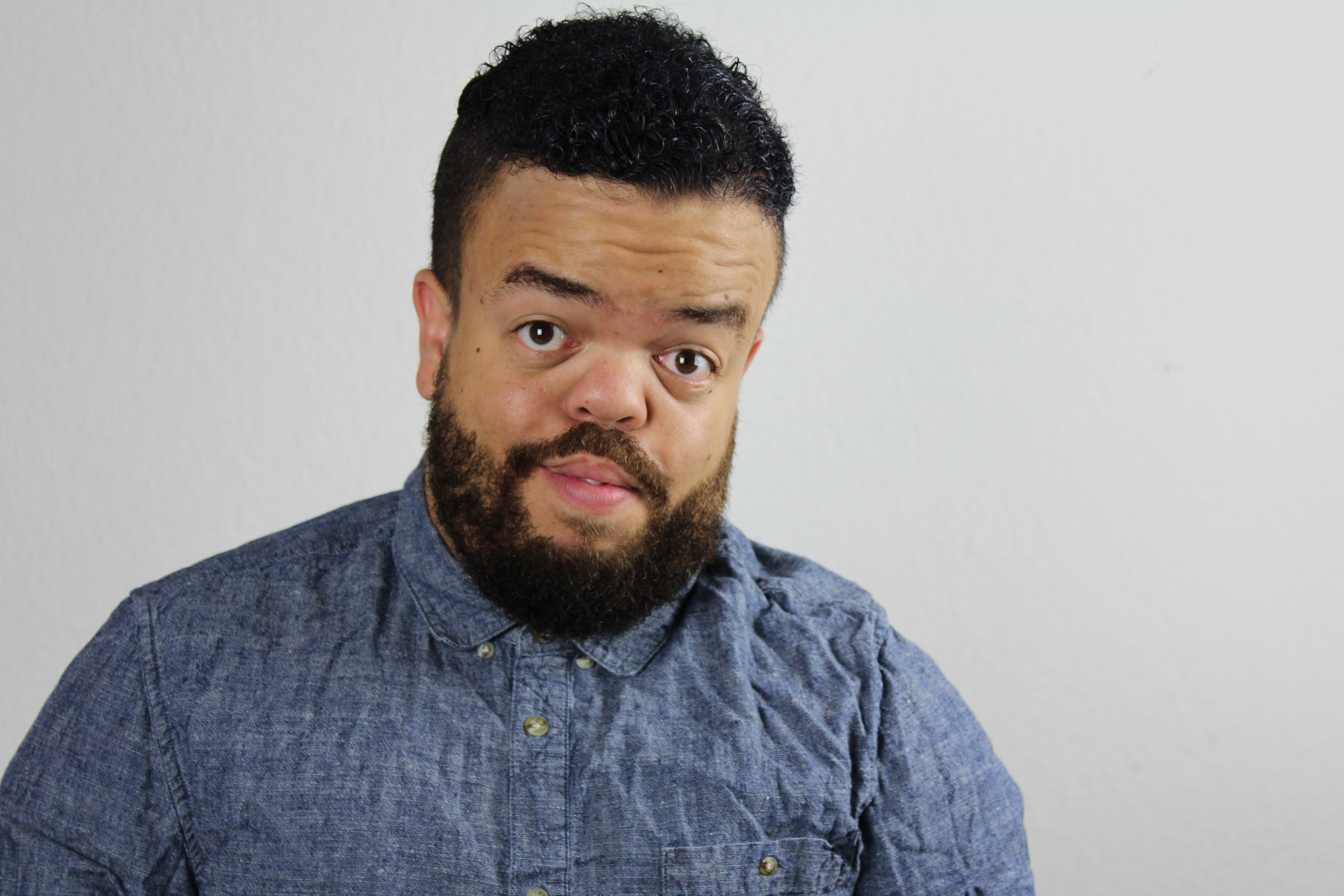 Selbstportrait 2016